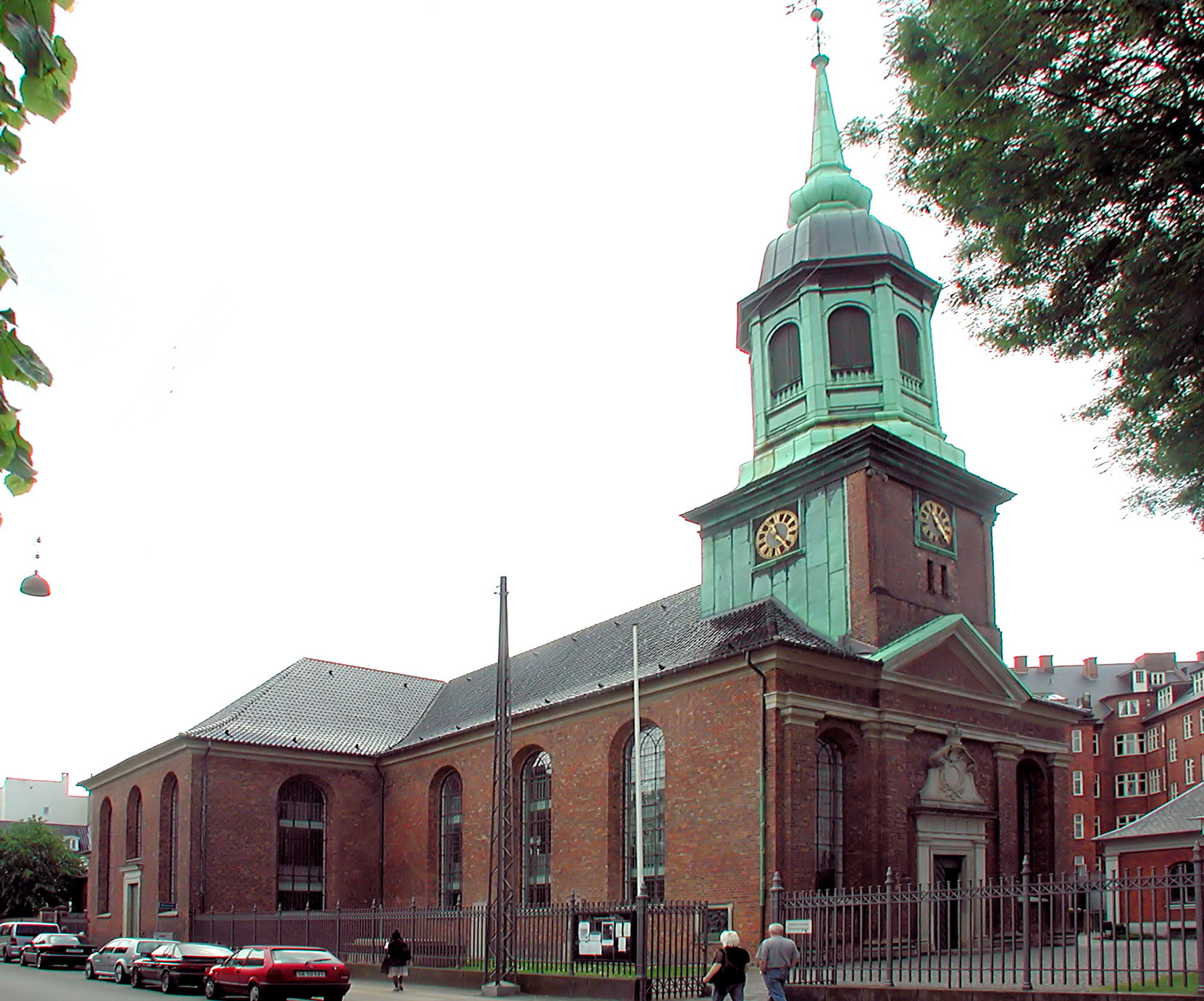 Garnisons Kirke (Garrison Church), Copenhagen, Denmark.